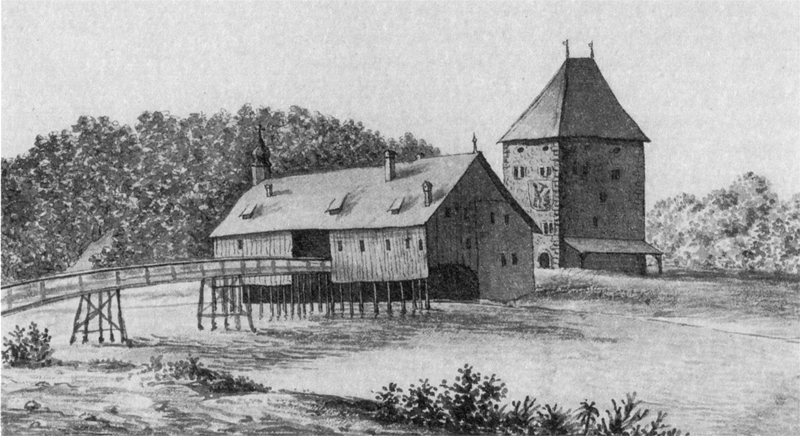 Turm und Schloss Grynau im 18. Jahrhundert.